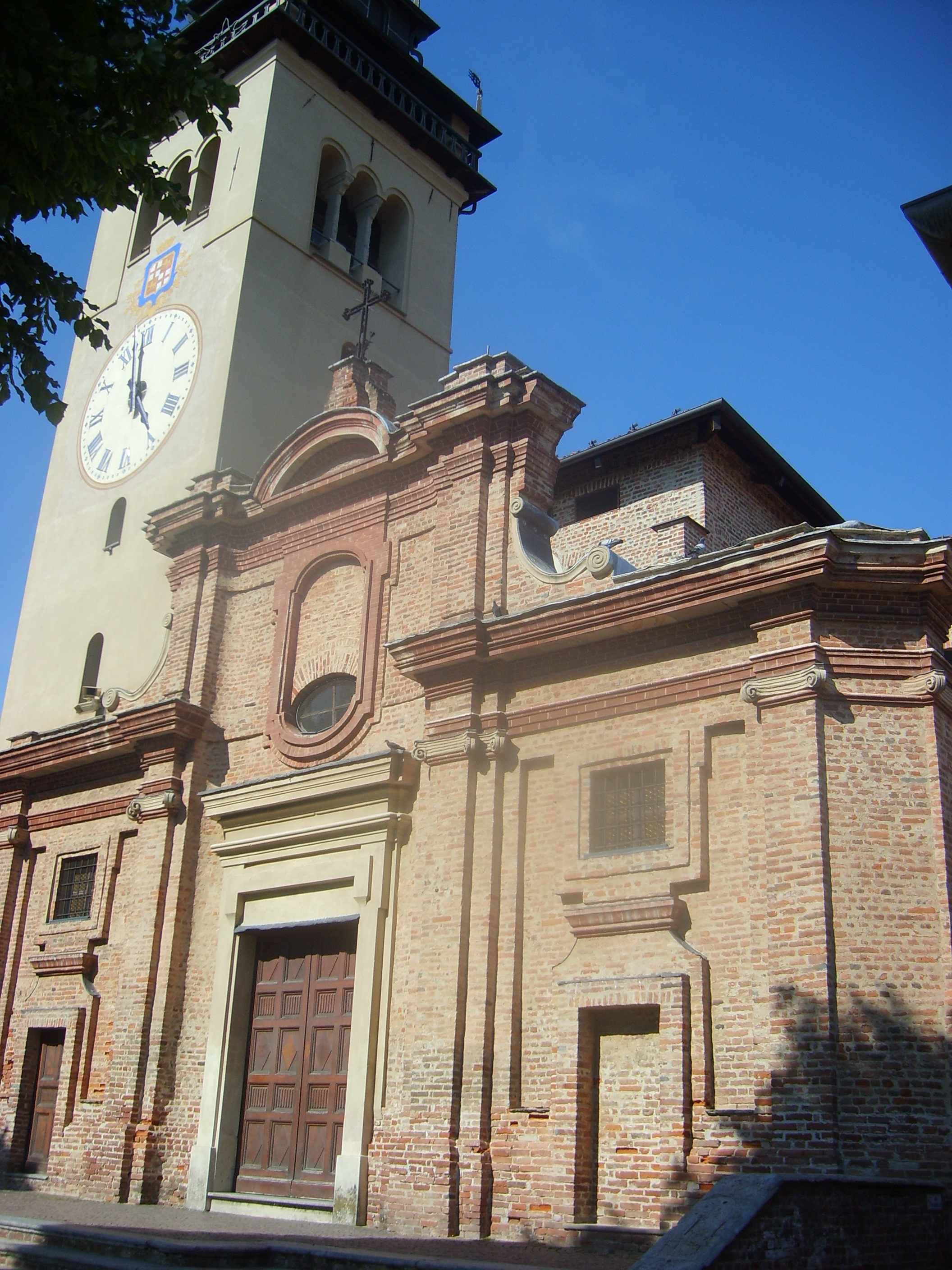 Facciata della Chiesa di San Giorgio a Chieri